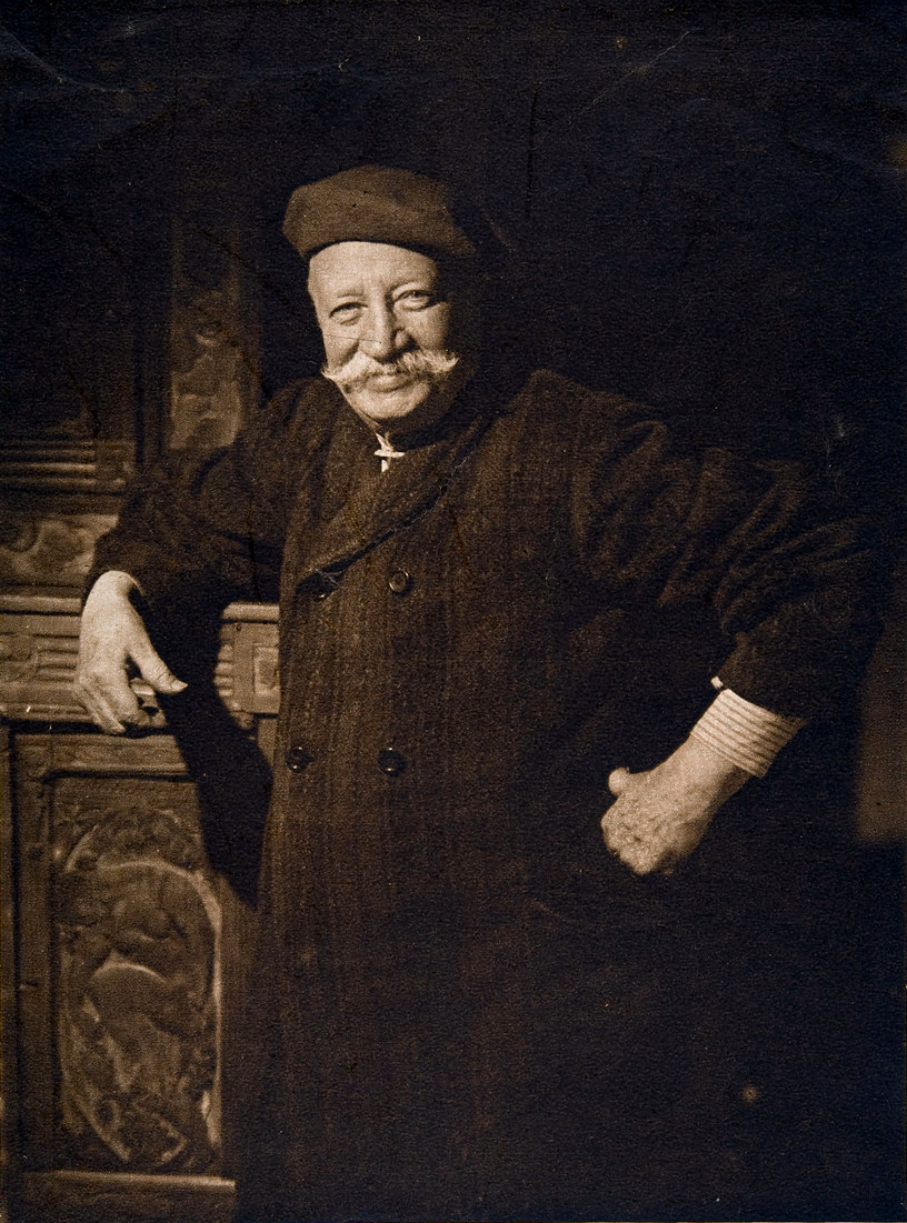 KARL VILHELM VILLE VALLGREN, professori, kuvanveistäjä, Suomen Taiteilijaseuran kunniajäsen, Ranskan kunnialegioonan upseeri, nerokas mestari ja elävä ihminen, väsymätön uurastaja ja uskollinen ihanteittensa palvoja, täyttää 75 vuotta 15.12.30.